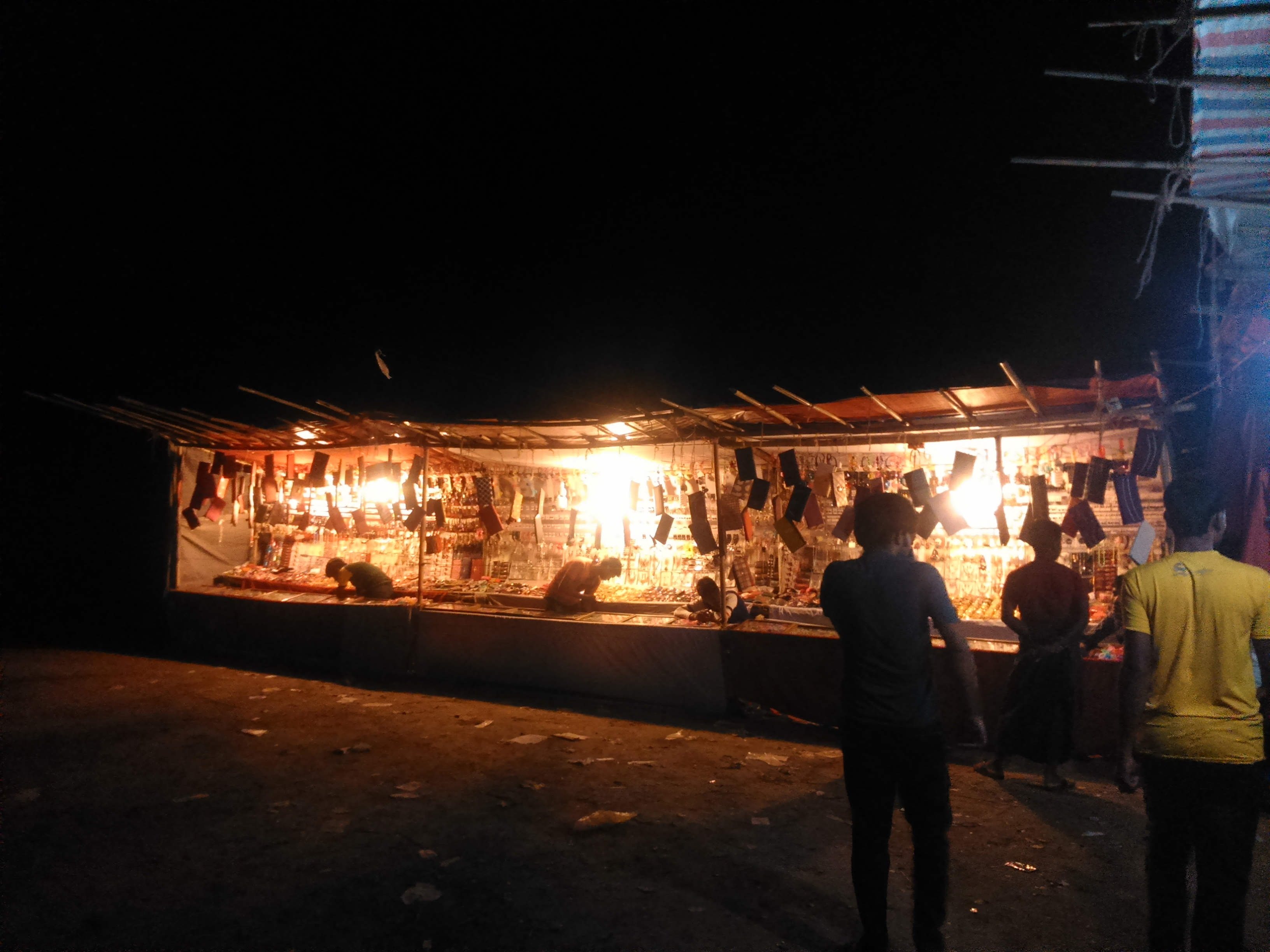 সরাইলের আলিনগর গ্রামের বৈশাখী মেলা